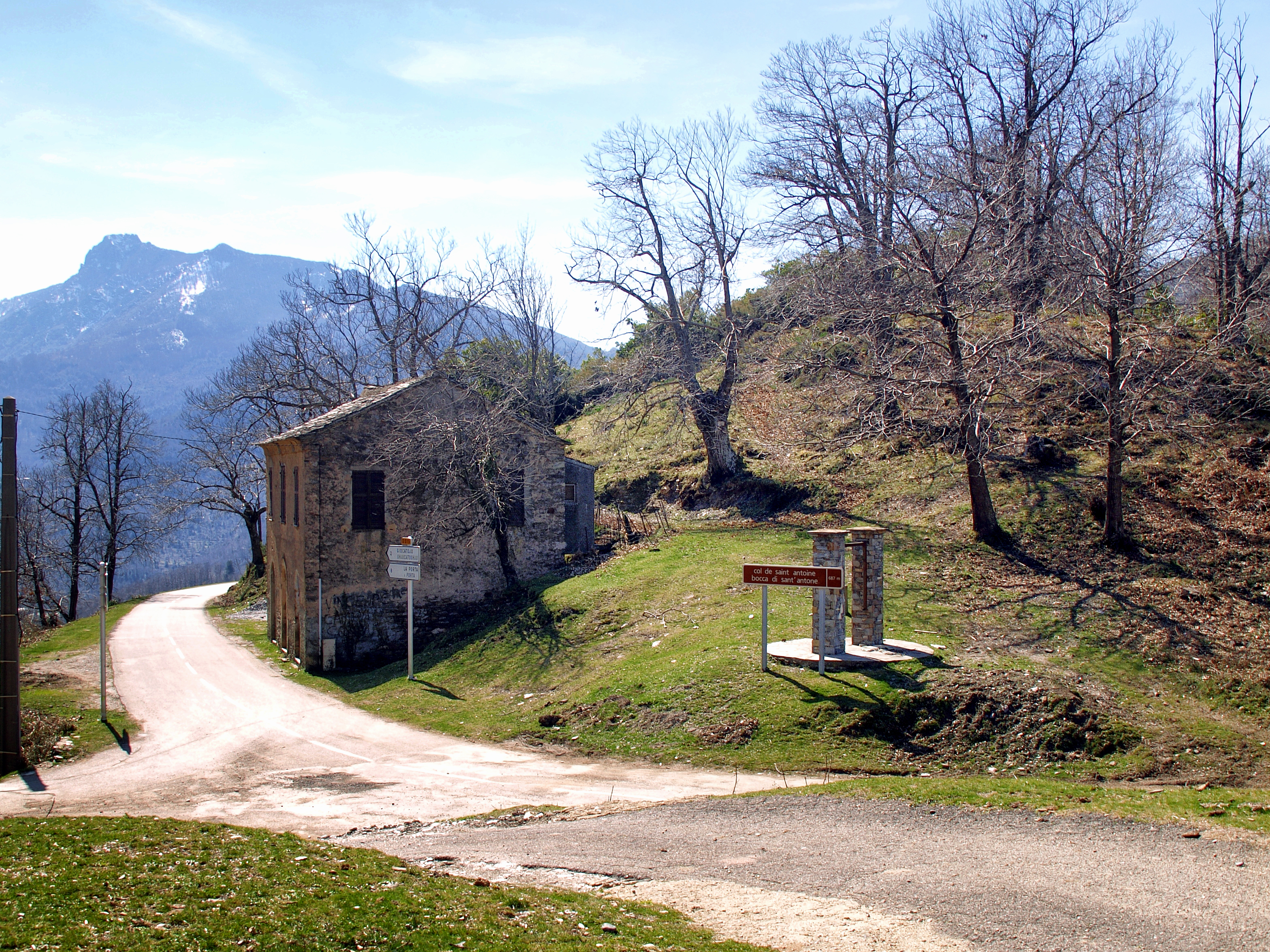 Casabianca, Castigniccia (Corse) - Col Saint-Antoine (Bocca di Sant'Antone), carrefour des routes D15, D515 et D237. À l'arrière-plan, le Monte San Petrone (1767 m).